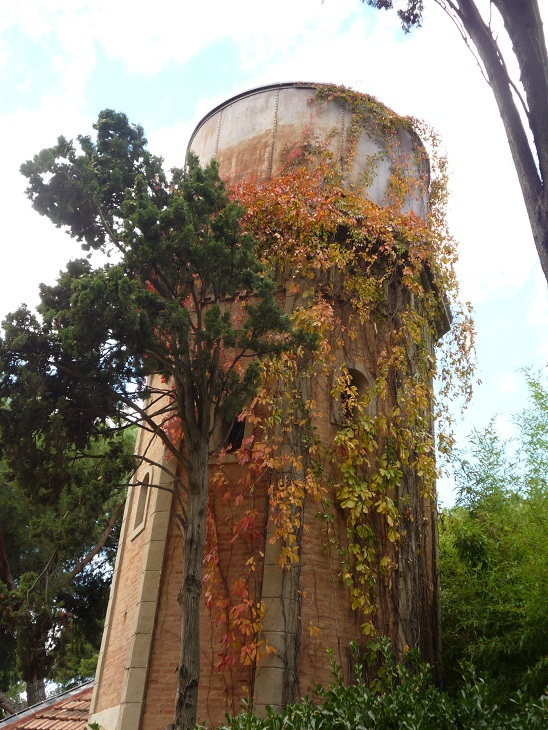 Castell del Parc de Ca l´Arnús de Badalona